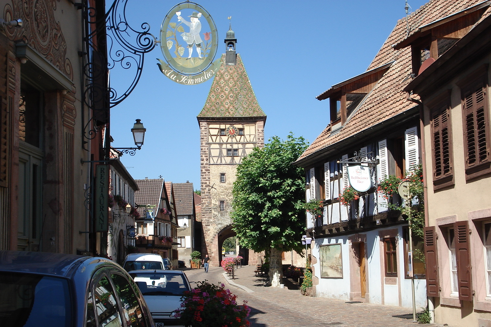 Bergheim, Haut-Rhin, Alsace, France. Grand'Rue, avec façade arrière (côté ville) de la Porte Haute ou Obertor (XIVe siècle).